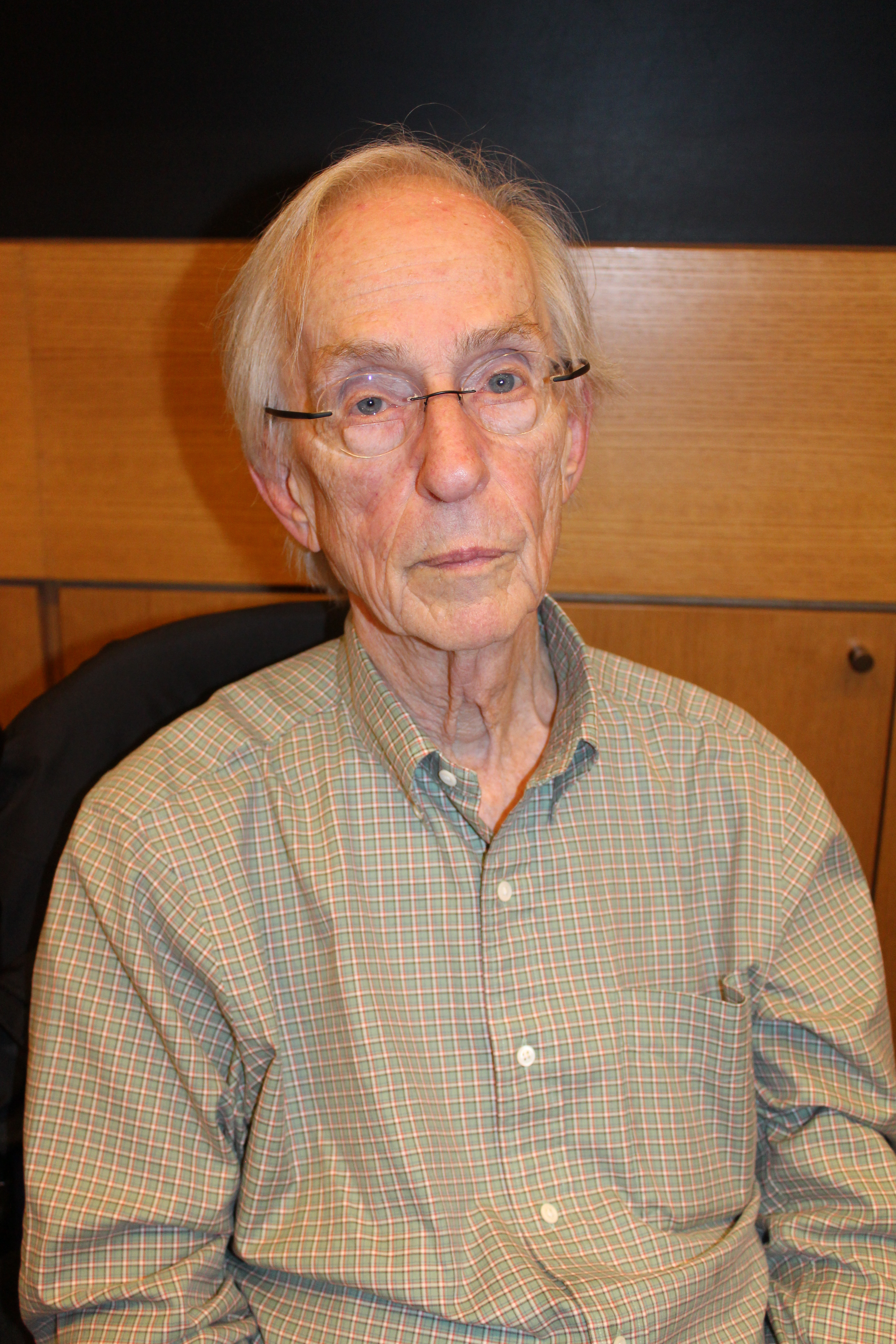 Howard S. Becker à l'École des hautes études en sciences sociales, à Paris.